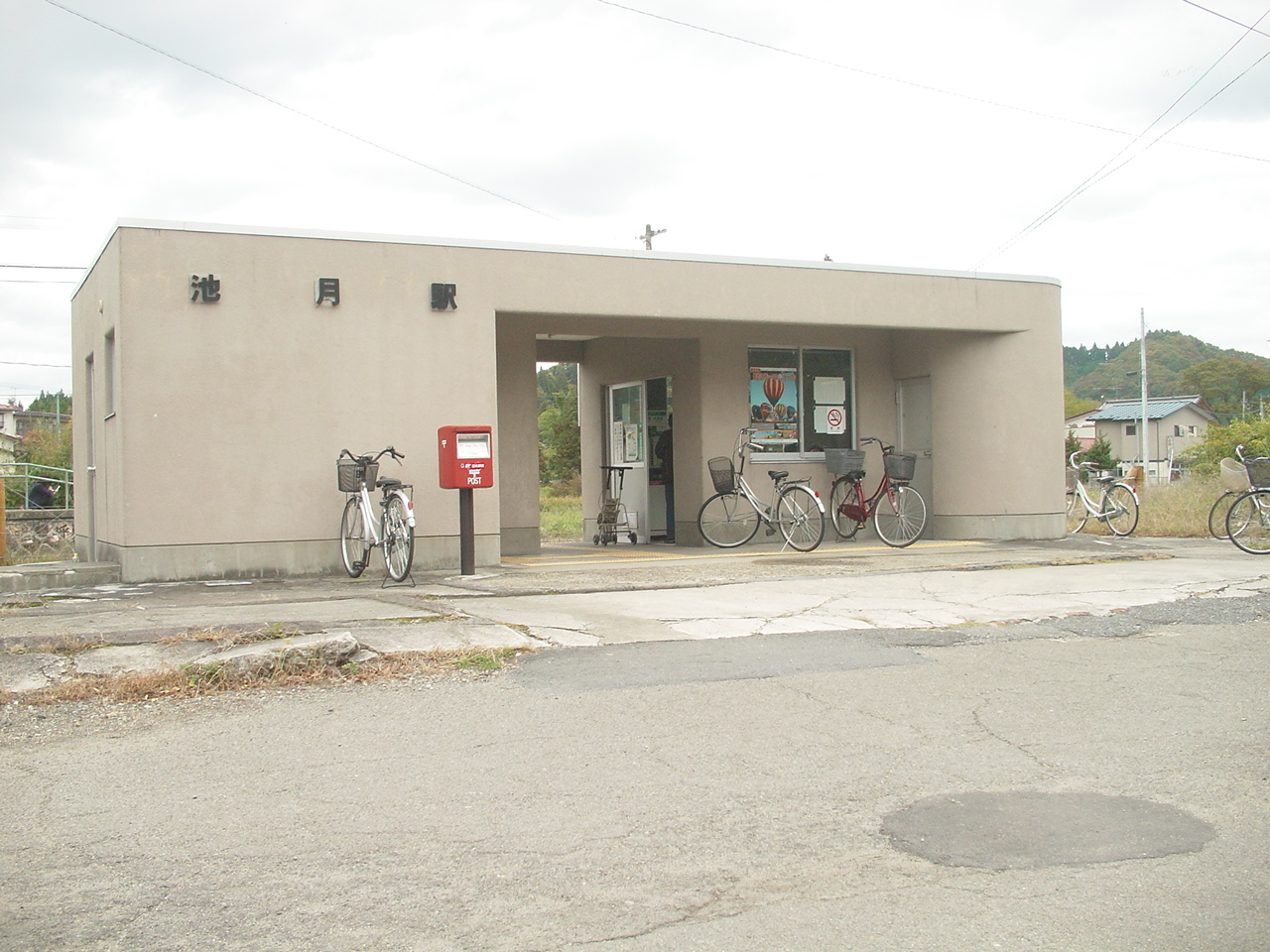 （池月駅）